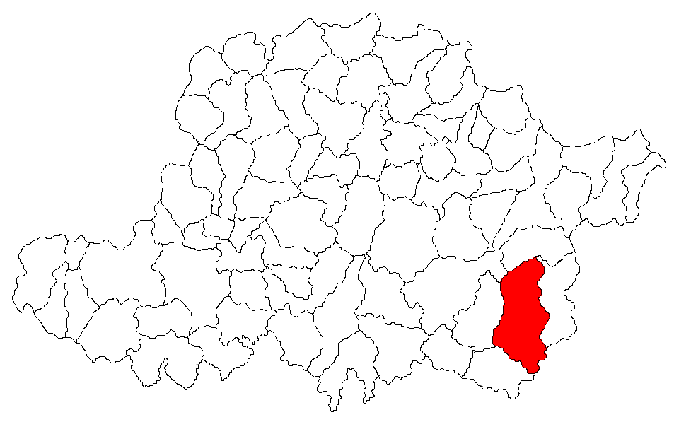 Categorie:Hărţi ale judeţului Arad